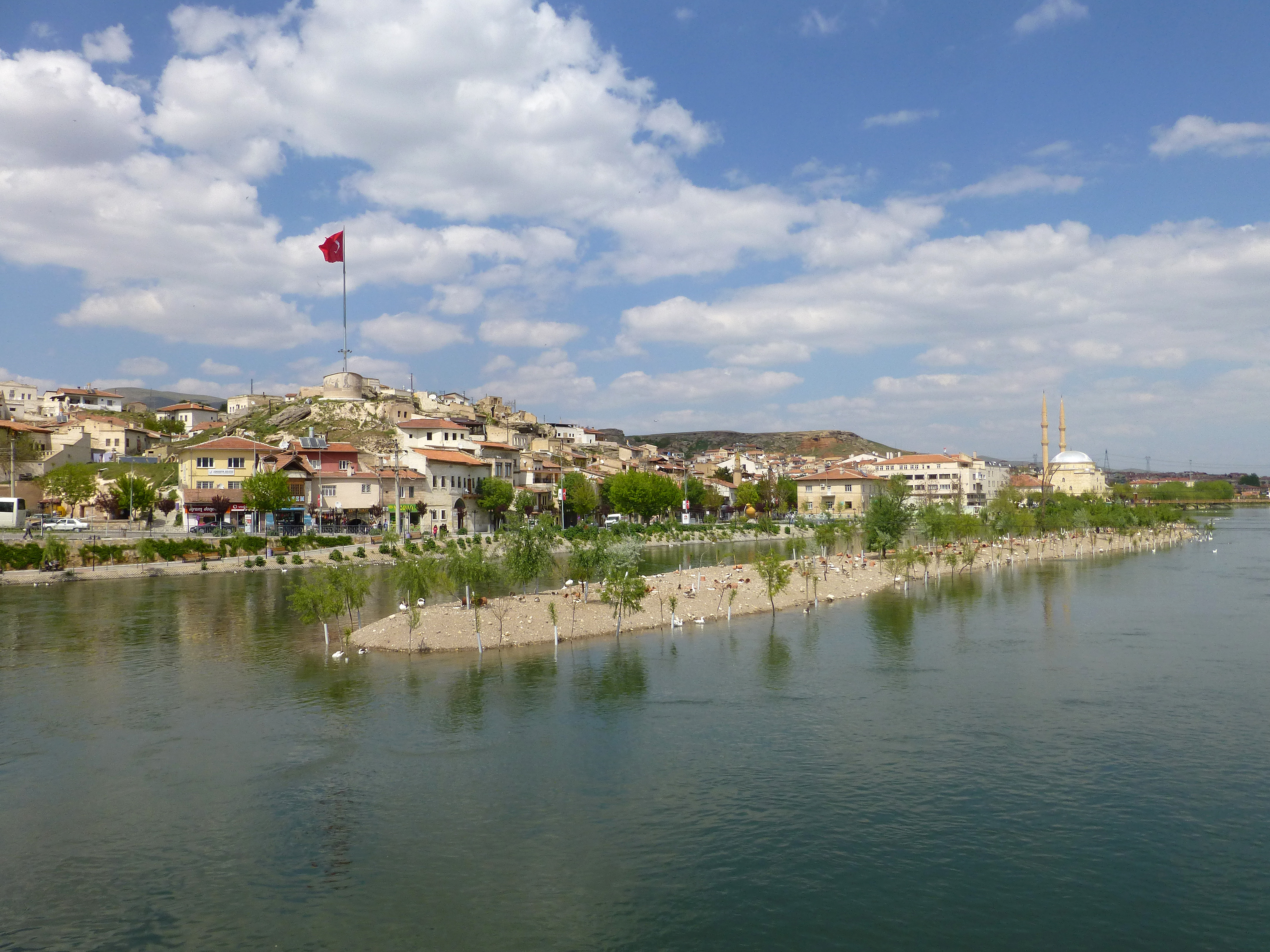 La ville d'Avanos au bord du fleuve Kızılırmak (Cappadoce, Turquie)